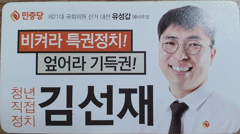 명함 앞면